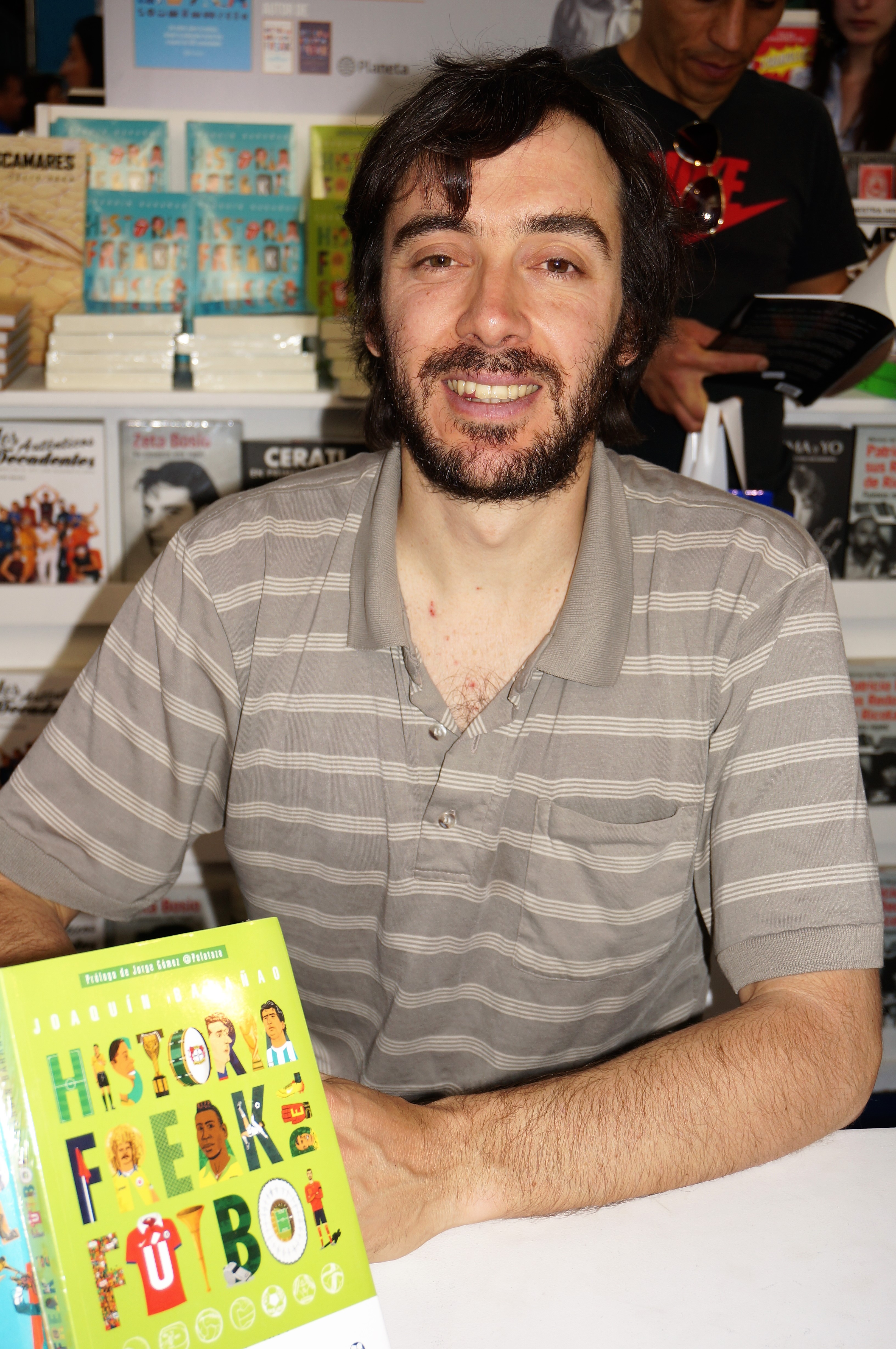 El escritor chileno Joaquín Barañao en el stand de la editorial Planeta en la Feria Internacional del Libro de Santiago 2017